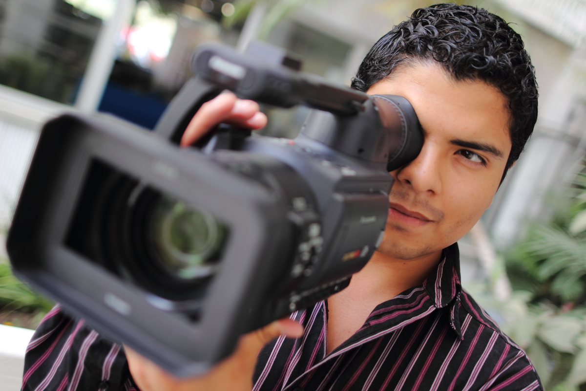 Fotografía por: Juan Manuel González Fernández